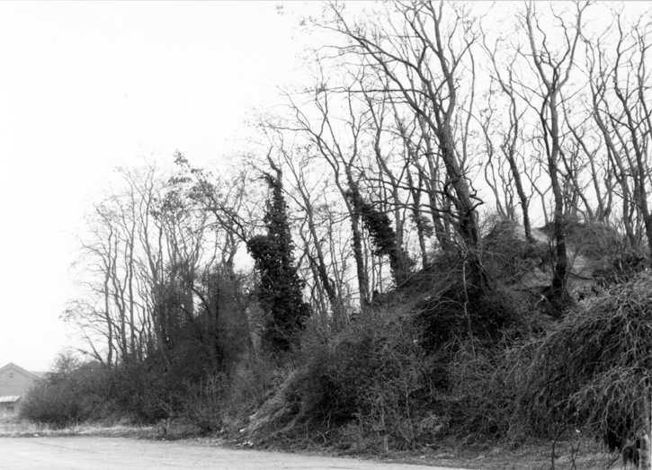 Three tumuli in Tienen (Belgium)